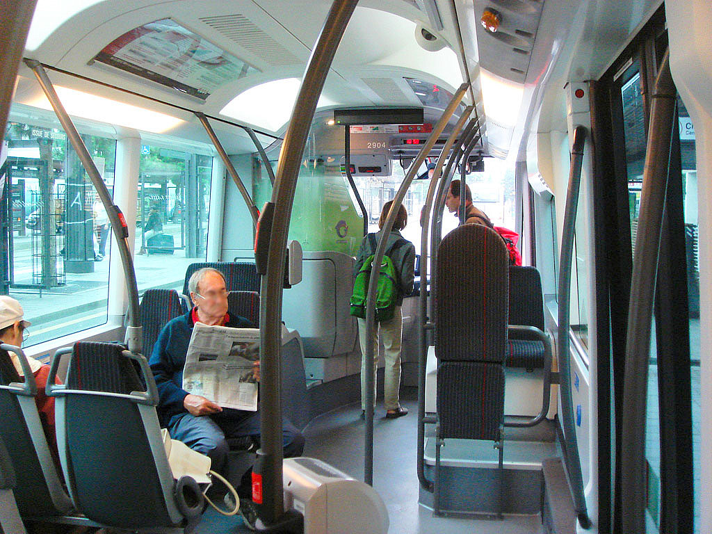 Trolleybus Cristalis de Lyon Ligne C1 intérieur d'un véhicule au terminus Part-Dieu Vivier-Merle (see the discussion page) for the change of size